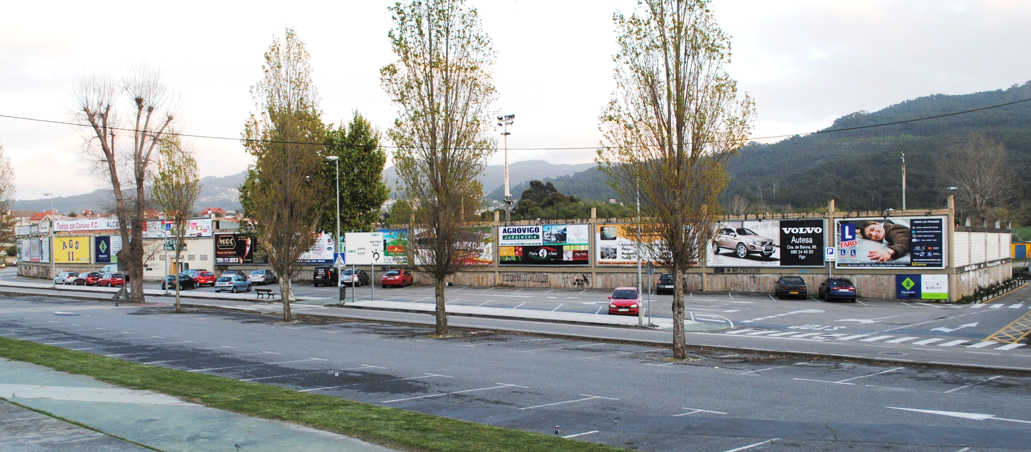 Campo do Vao, Coruxo, Vigo